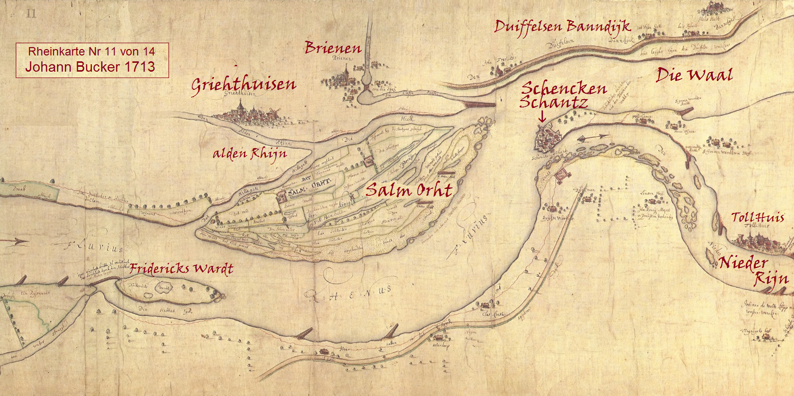 Rheinkarte von Johann Bucker, Rhein bei Schenckenschantz anno 1713